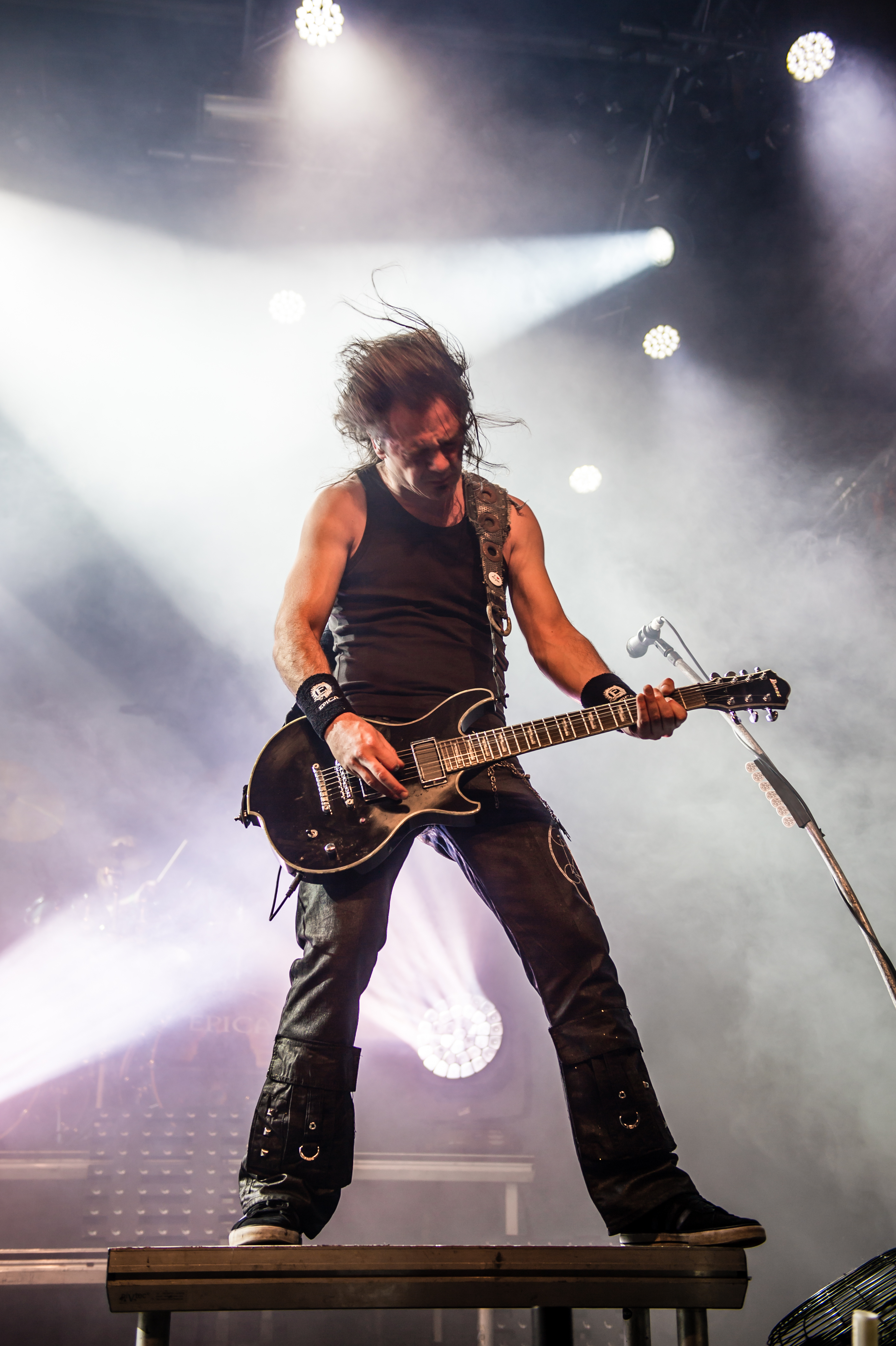 'Epica - Epic Metal Fest - Eindhoven'